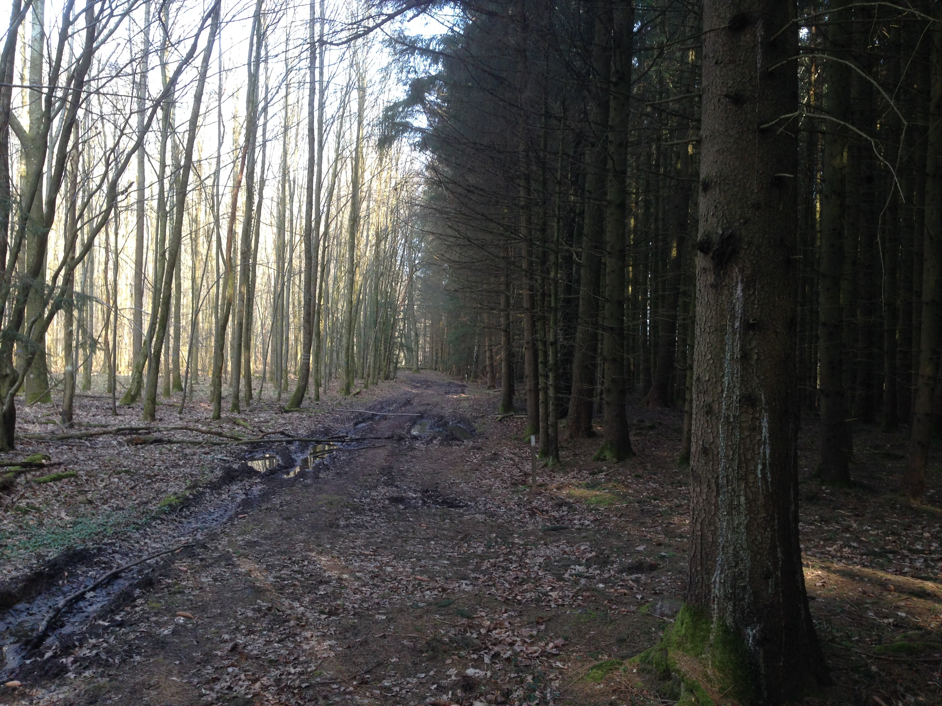 Links Staatswald, rechts Privatwald (Fichte); LSG Westerholz